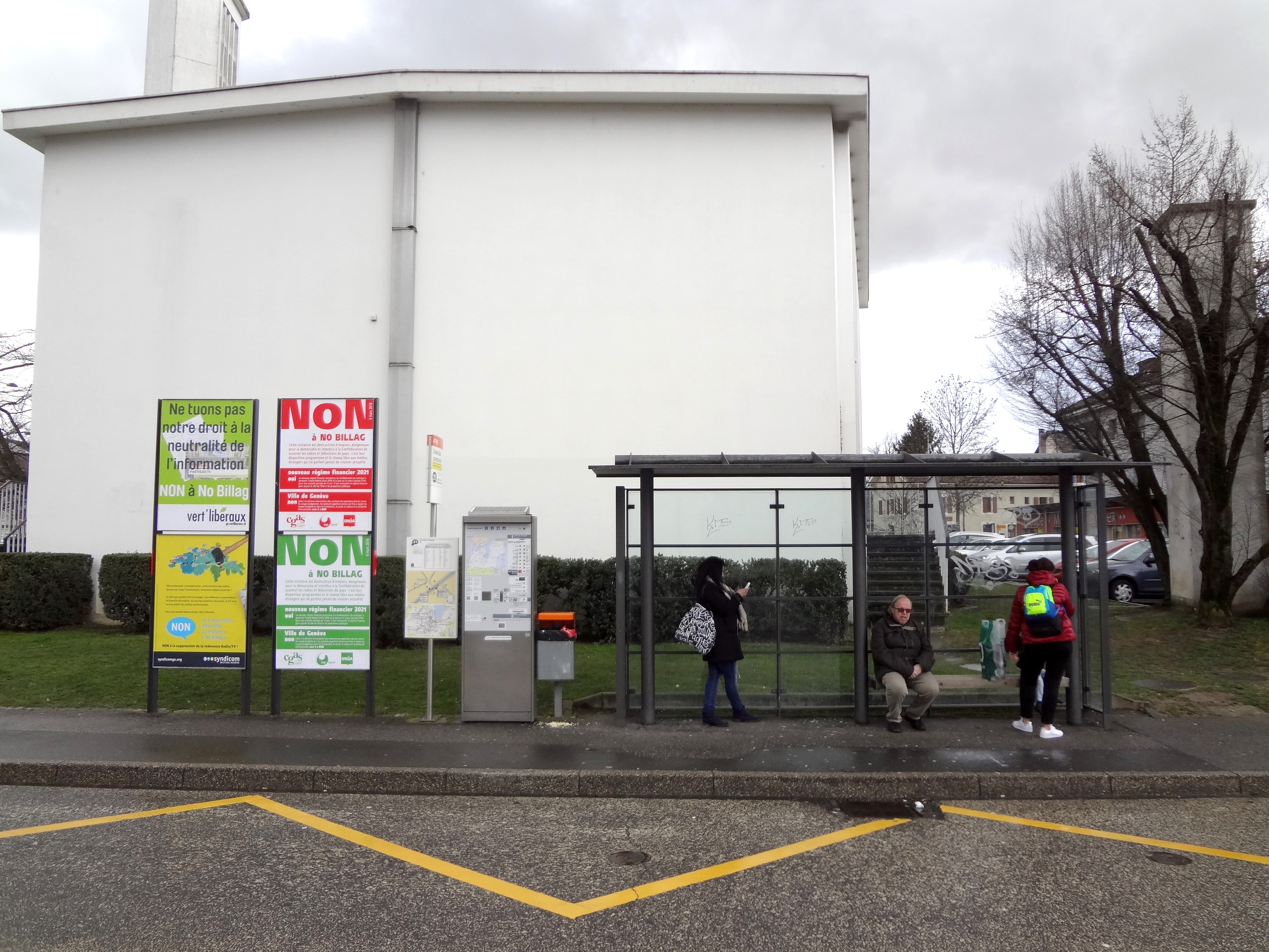 Affichage public concernant l'initiative populaire fédérale « Oui à la suppression des redevances radio et télévision », dite « No Billag ». Onex, derrière l'église protestante, route de Loex. Arrêt de bus ligne 21 « Onex-Salle communale » (direction Gare des Eaux-Vives).